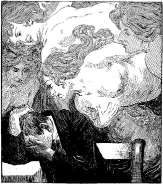 Aus: Franz Müller-Münster: Stürmen und Drängen. Berlin, Fischer und Franke, [1902]. 10 Blätter mit ganzseitigen Zeichnungen (Teuerdank. Fahrten und Träume deutscher Maler 3. Folge)